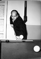 Pepe Gálvez